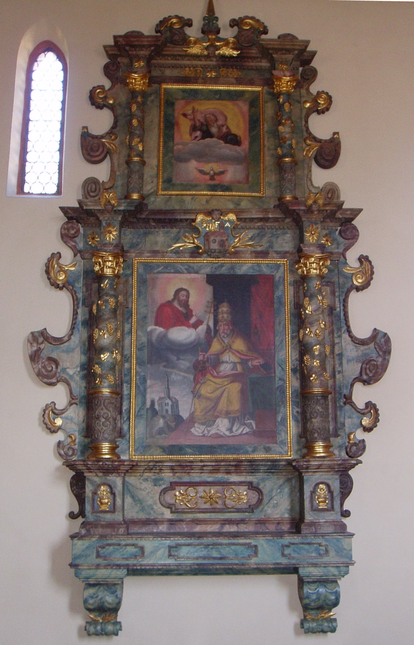 Bilderwand des Hauptaltars der Kirche von Wittelbach